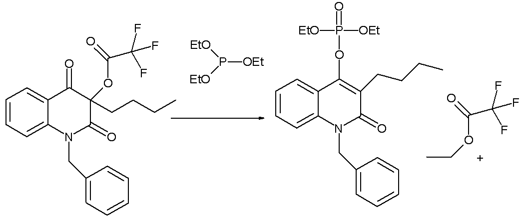 Perkow quinoline application